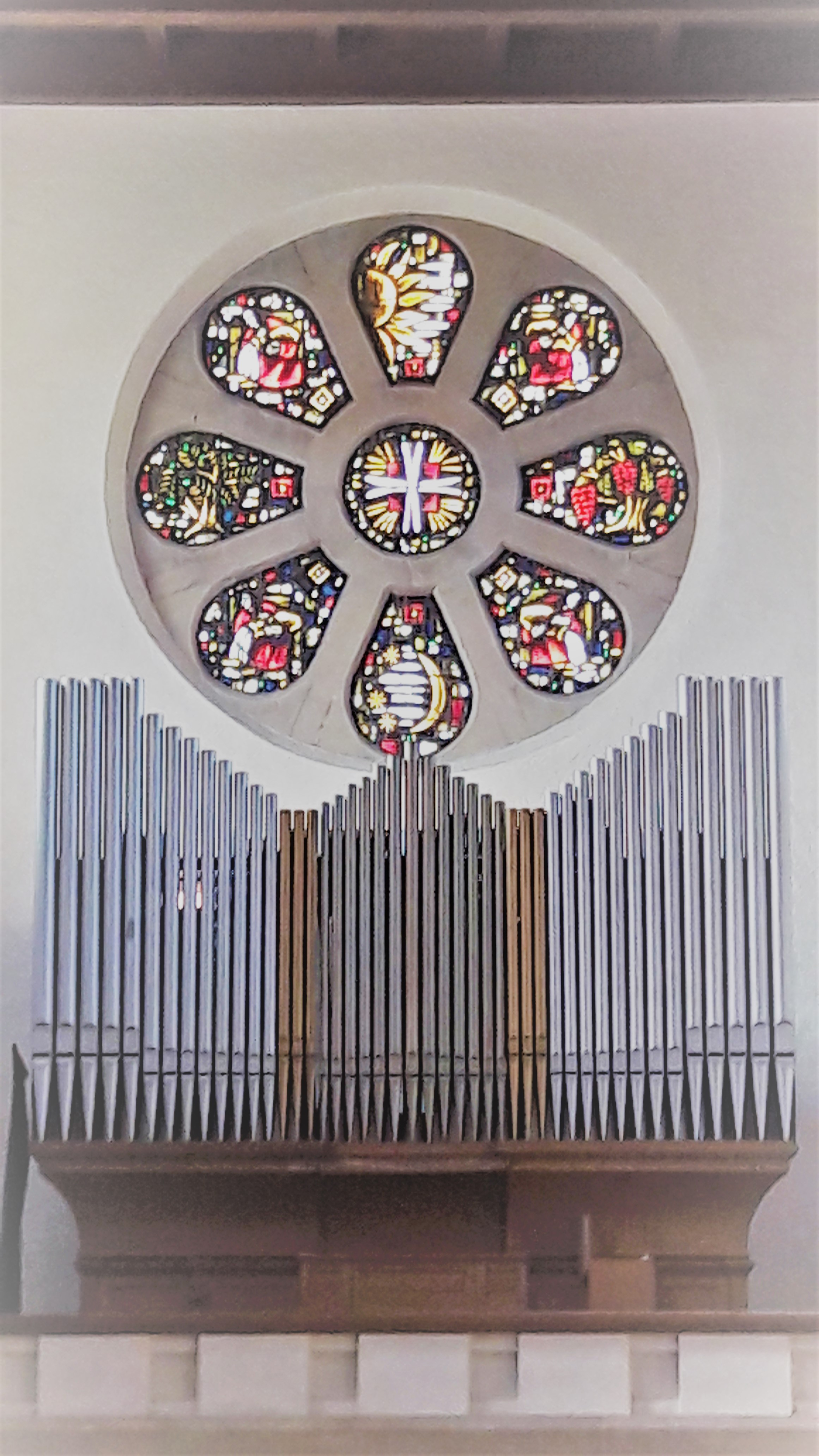 Uergel mat Fënsterrous an der Benediktinerabteikierch zu Klierf